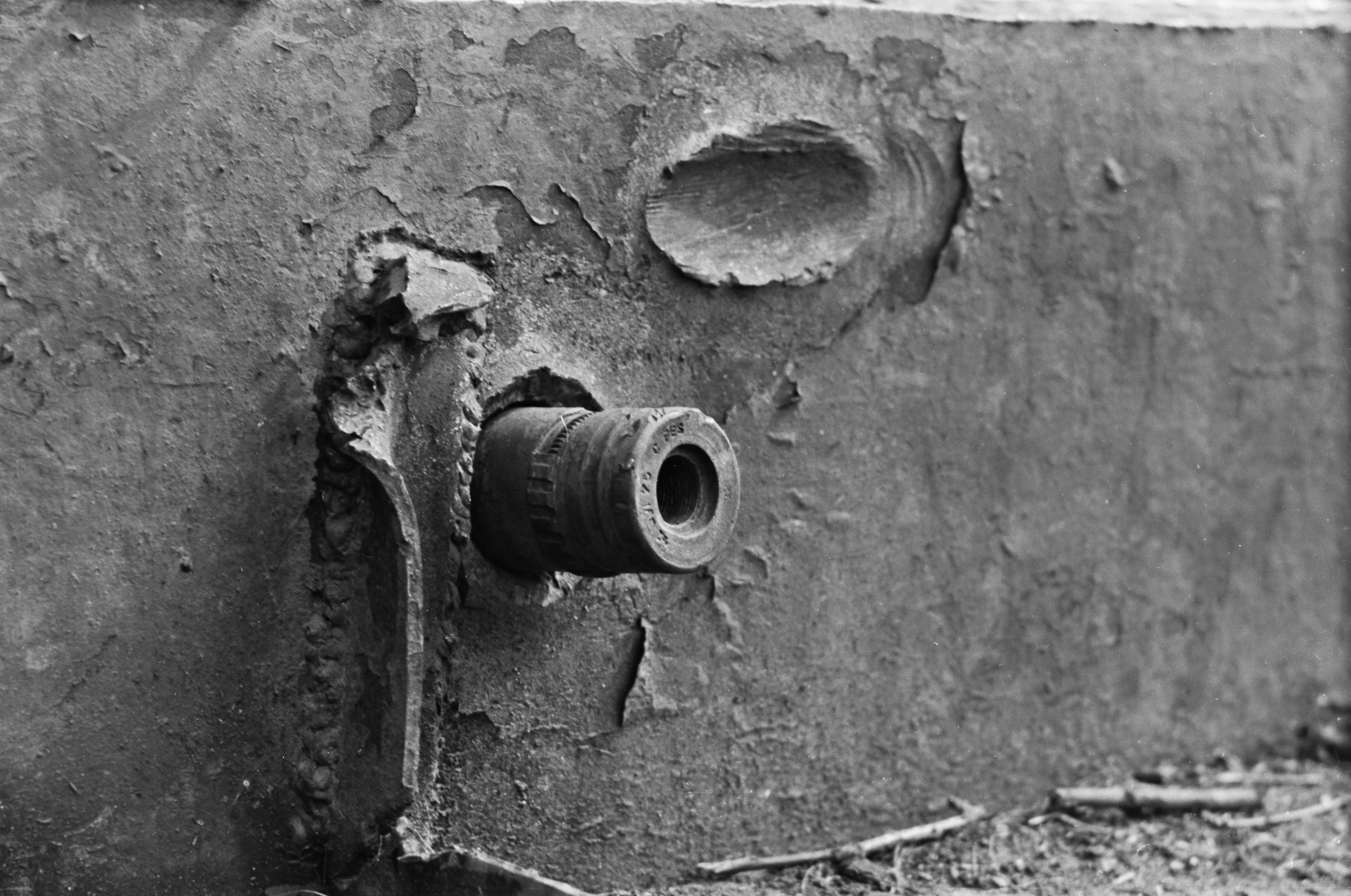 A szovjet hadsereg KV-1 típusú nehéz harckocsija.